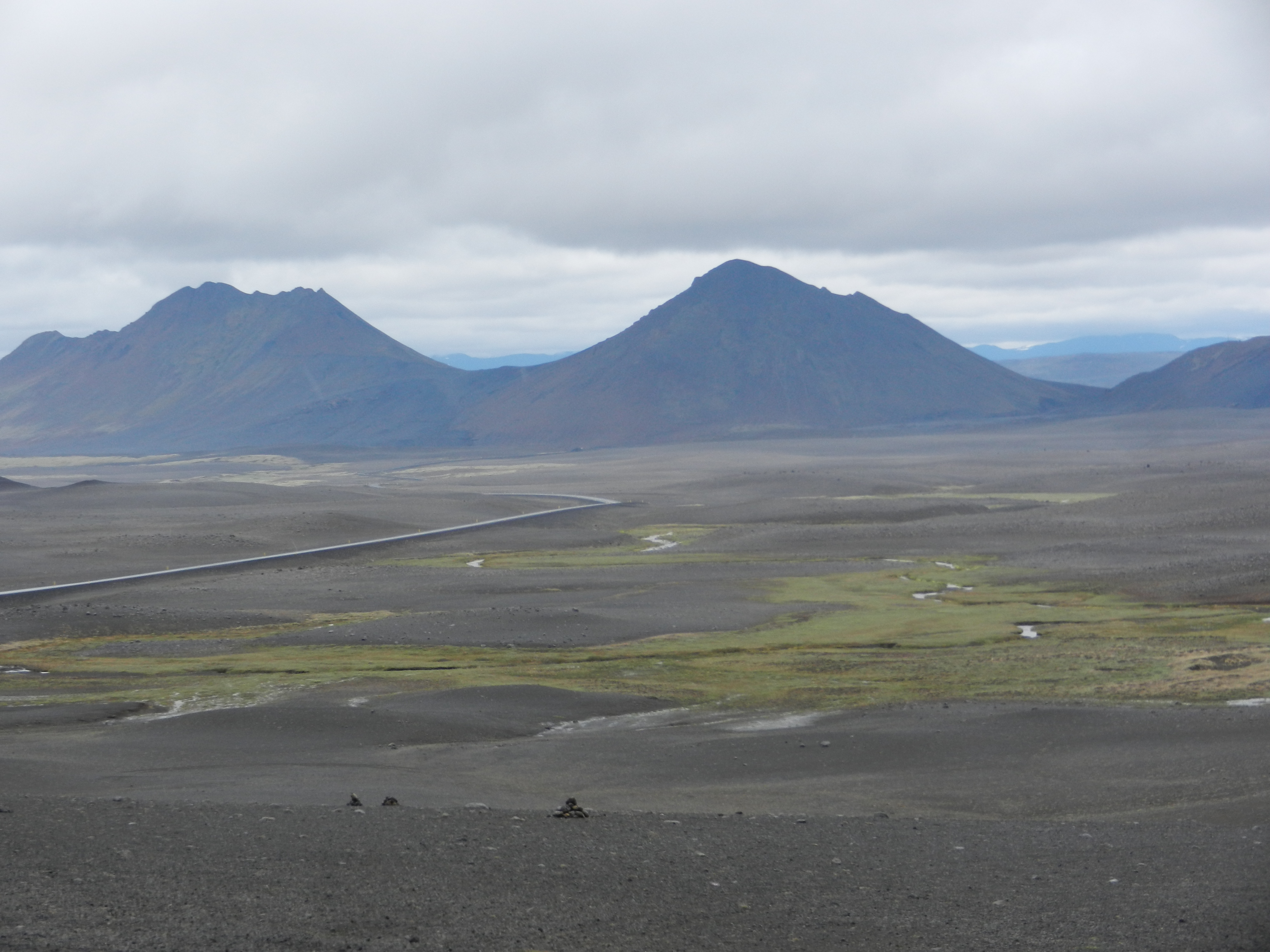 Možici ob cesti proti Dettifossu, Islandija.